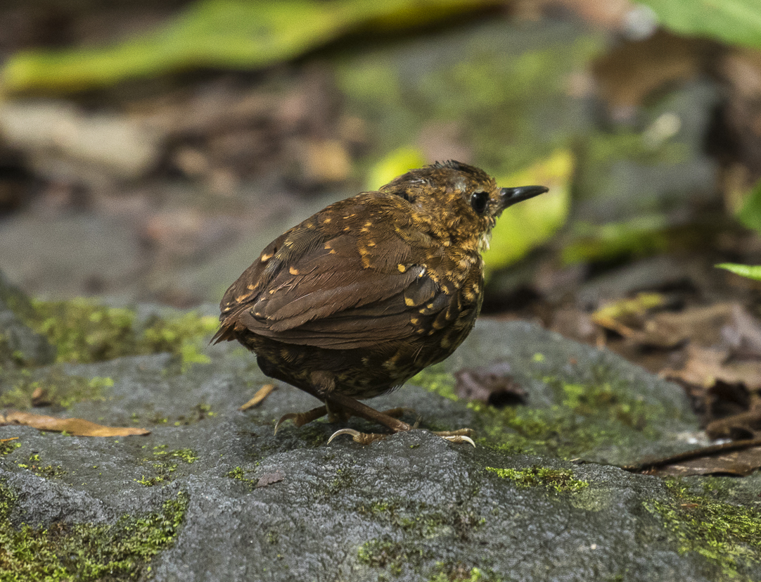 Pygmy Wren-Babbler - Gunung Gede_MG_4123